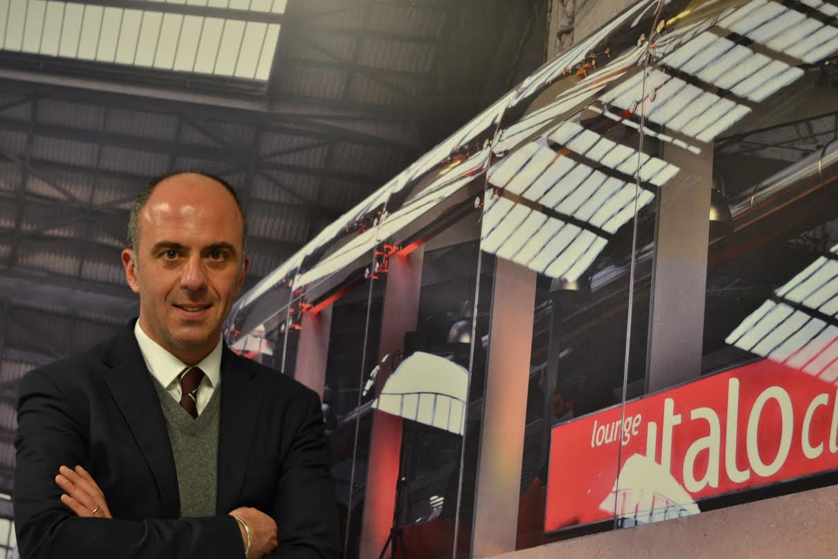 Foto biografia